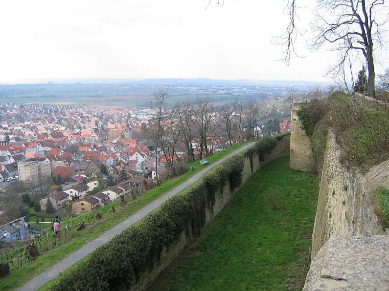 Blick auf Asperg, Württemberg, vom Hohenasperg